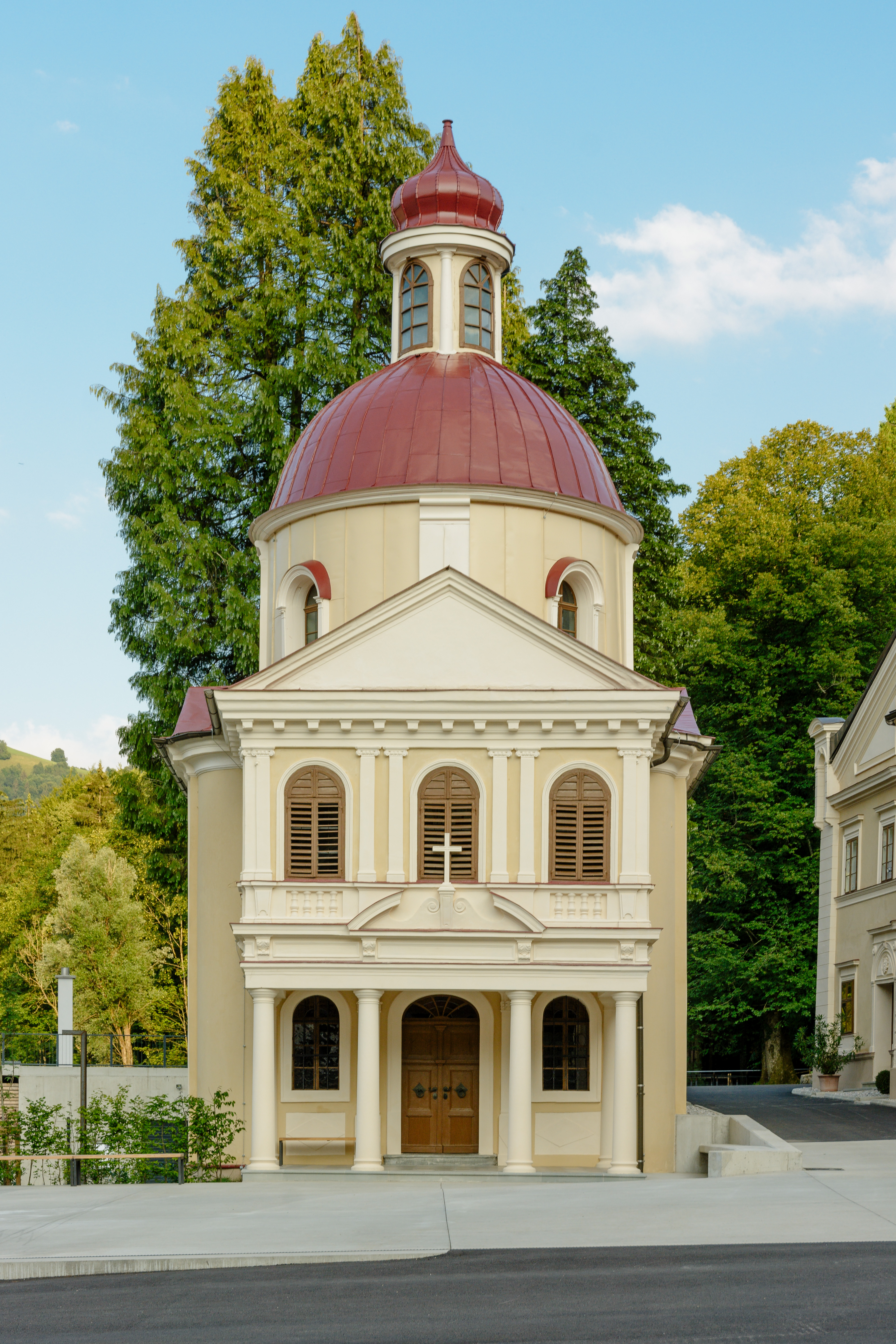 Töpperkapelle hl. Apostel Andreas